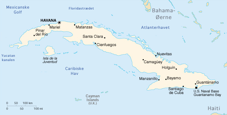 Kort over Cuba med danske stednavne